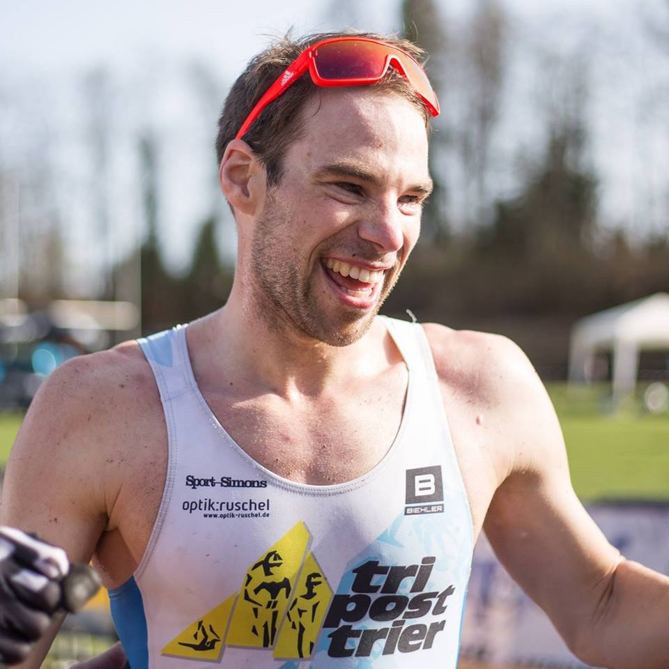 Jens Roth beim Gewinn der deutschen Meisterschaft im Cross Duathlon